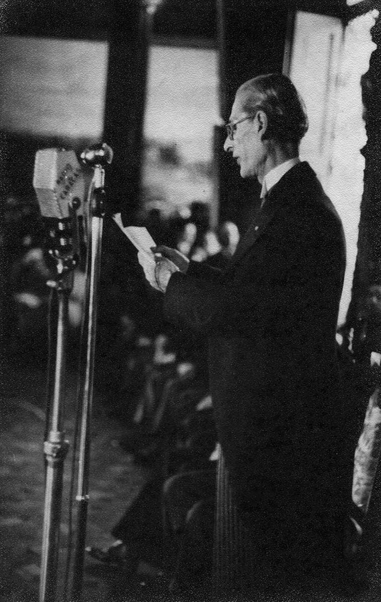 El presidente saliente, Eleazar López Contreras durante la toma de posesión de Isaías Medina Angarita. Palacio Federal Legislativo de Caracas. (Fundación Fotografía Urbana).